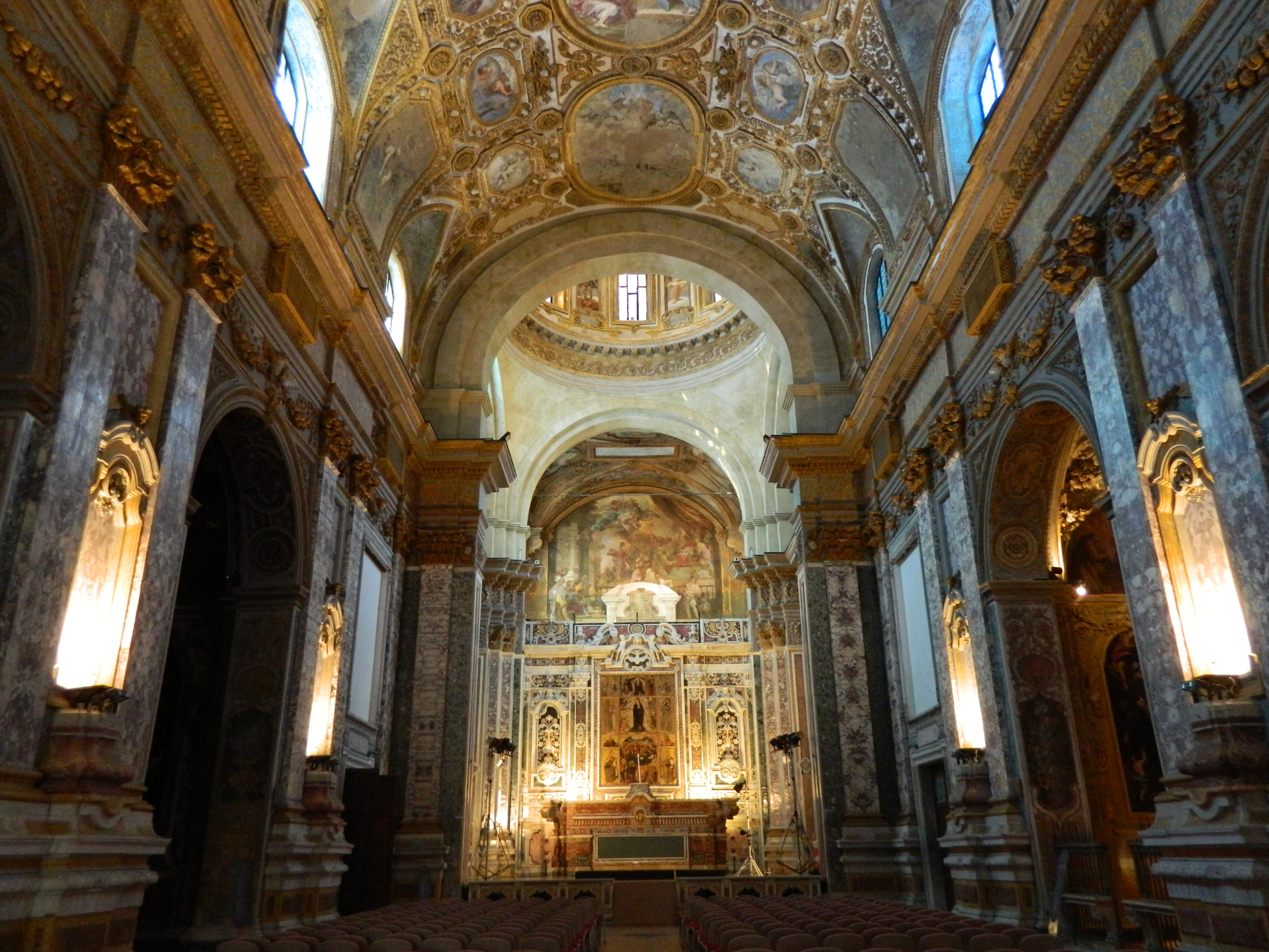 Chiesa di Santa Maria Donnaregina Nuova - Interno